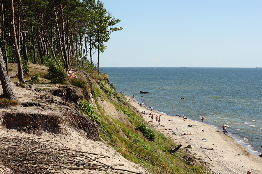 Olando kepurės skardis.